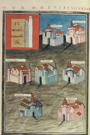 Dux Moesiae secundae from Notitia dignitatum